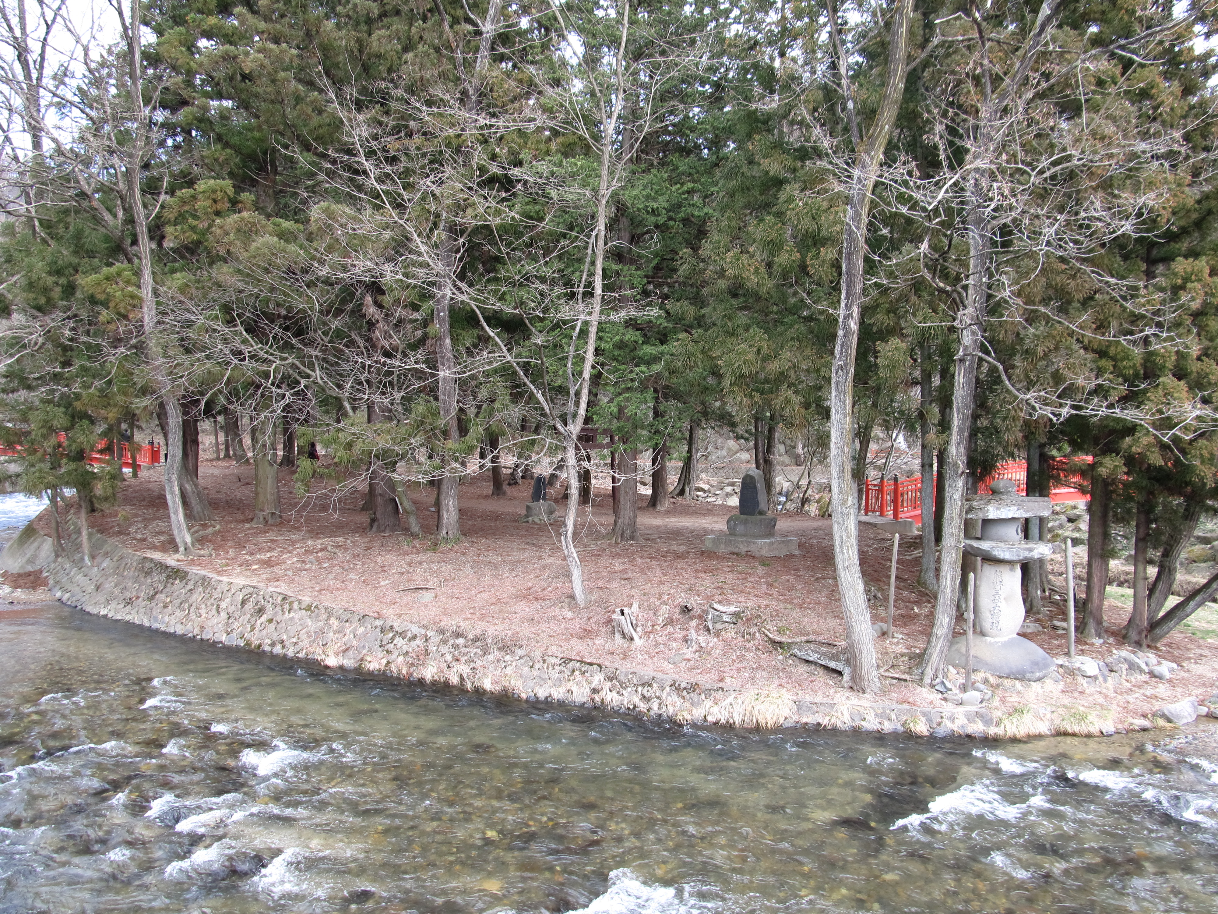 長野県諏訪郡下諏訪町の砥川にある中州・浮島。神威により大洪水でも決して水没しないといわれ、諏訪大社七不思議の1つに数えられる。